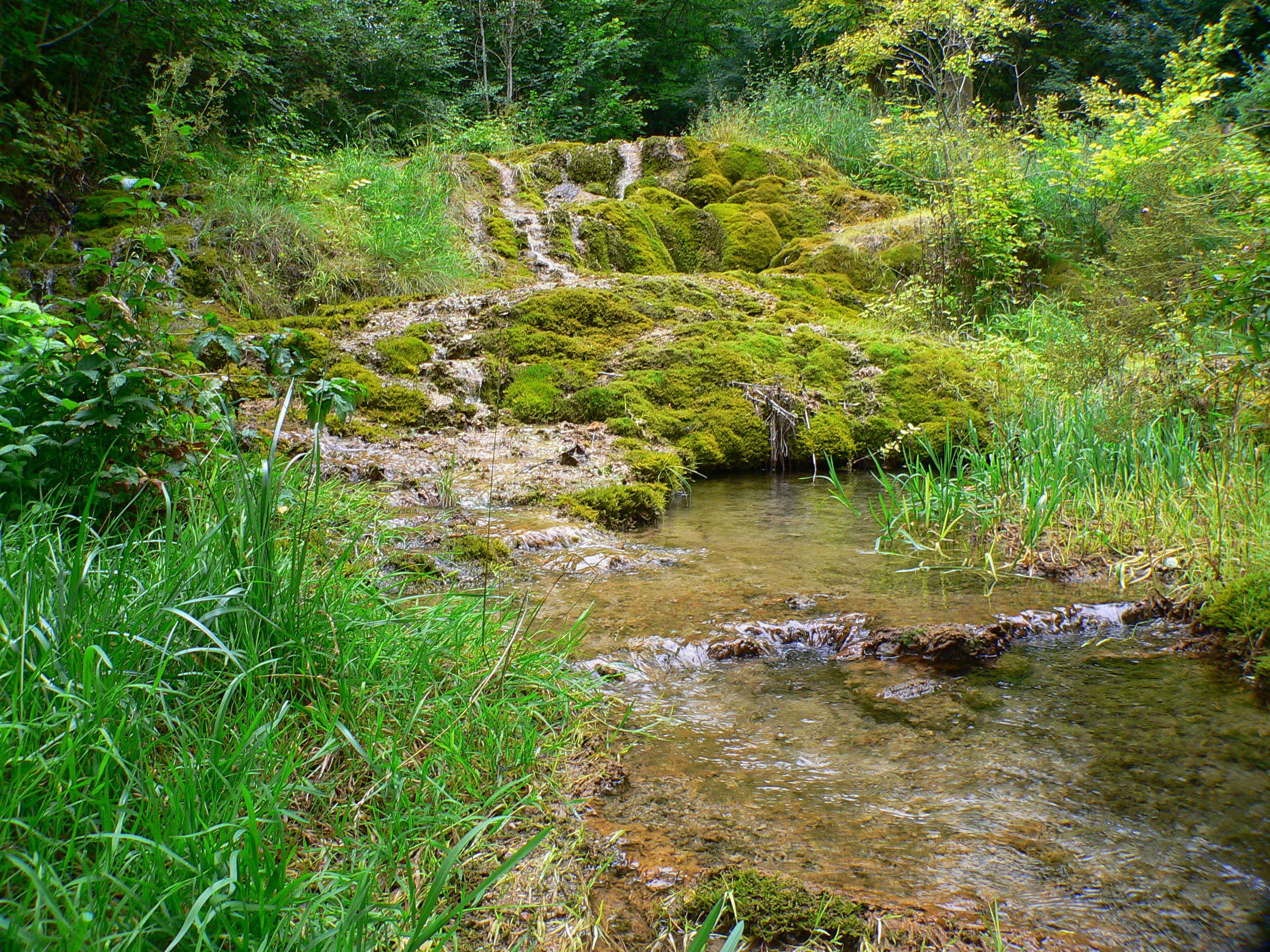 Sinterterrassen Birkertsbach in Weißenbrunn vorm Wald, Bayern, Deutschland